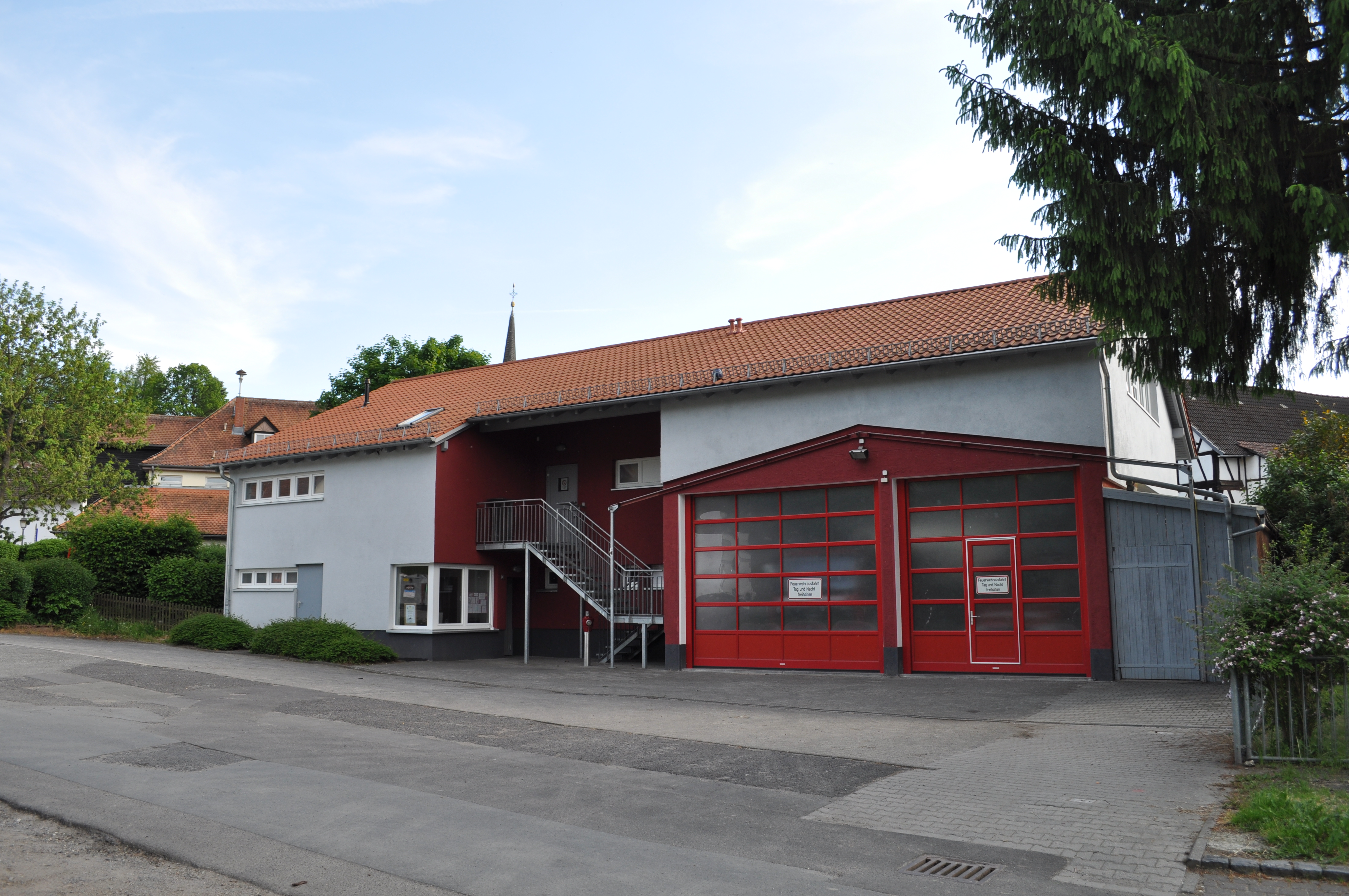 Feuerwehrgerätehaus in Oberems